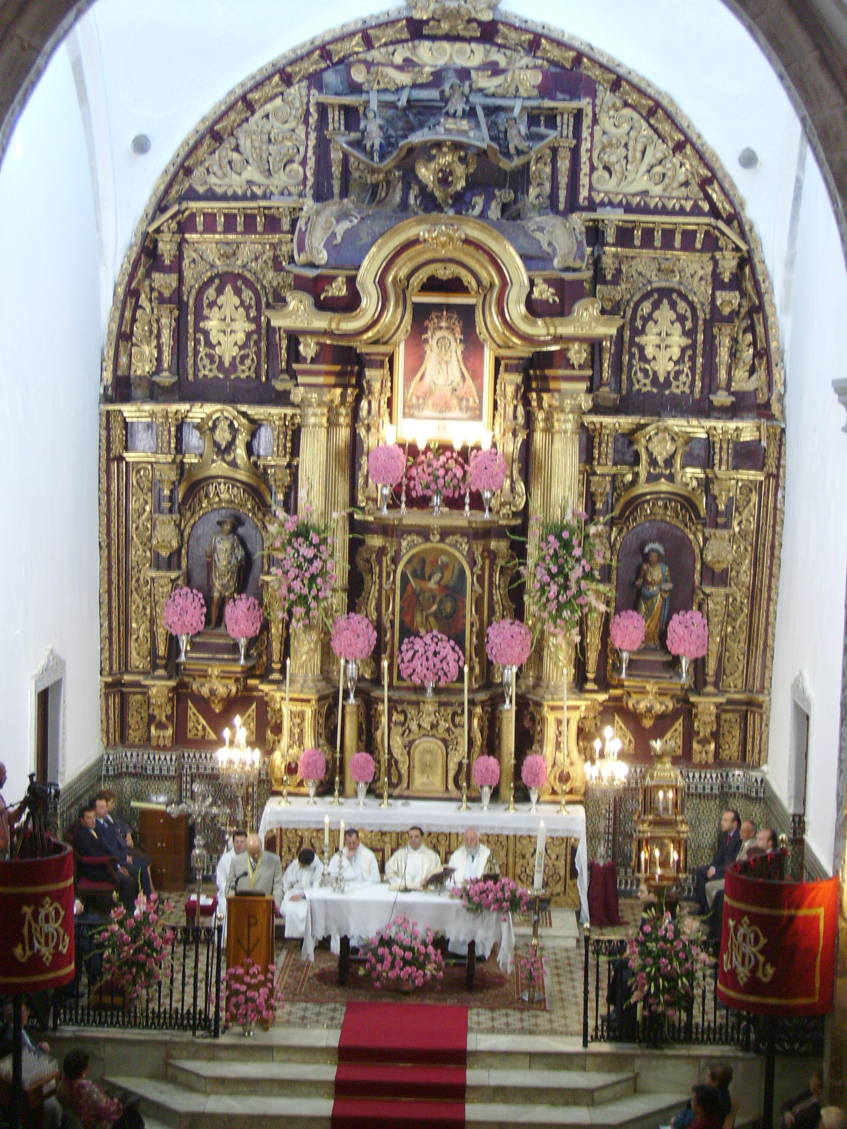 Santa Maria